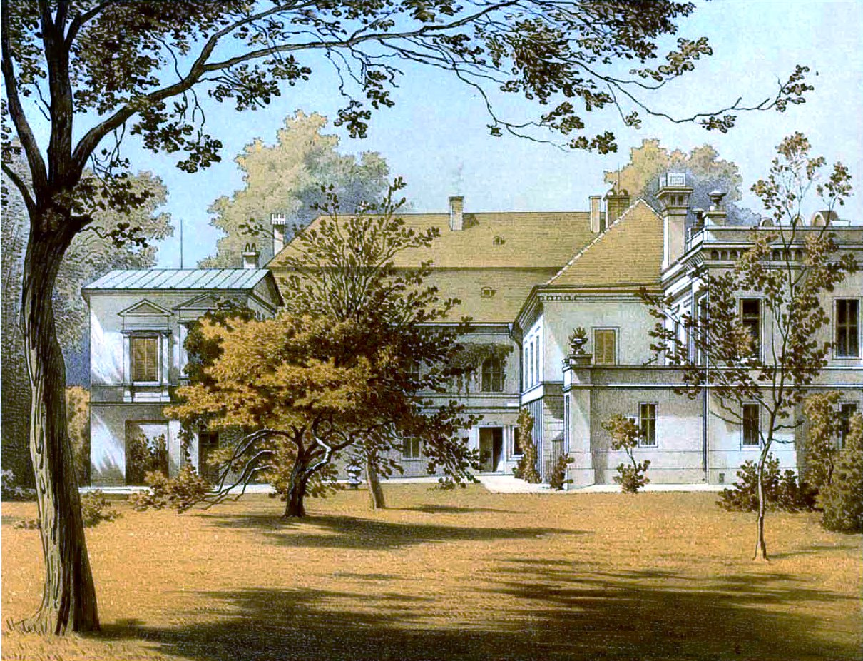 Rittergut Schwierse, Kreis Oels, Provinz Schlesien